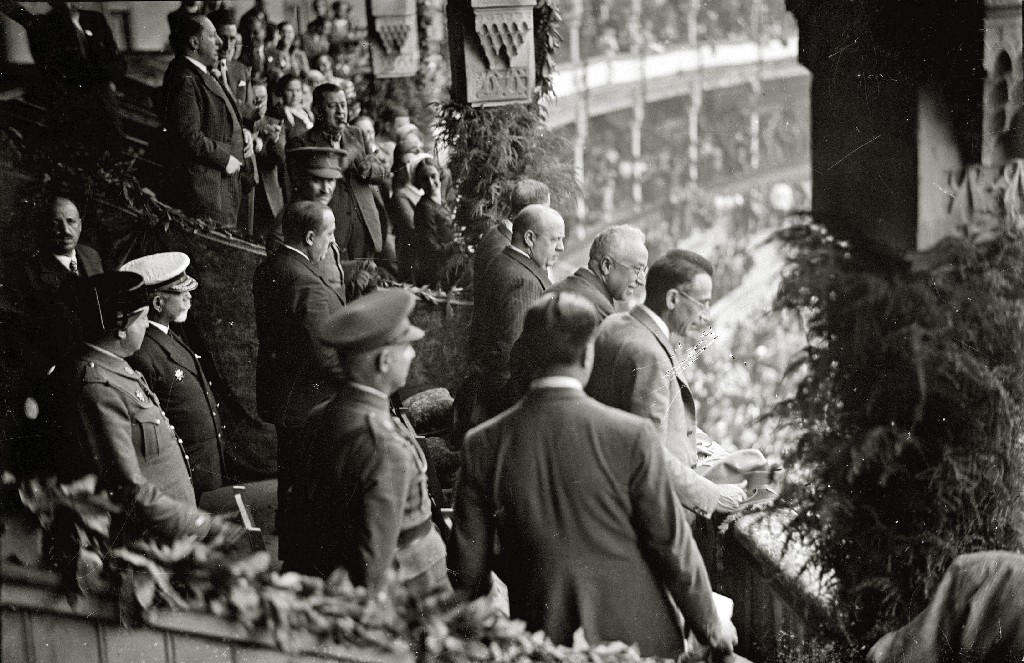 Título original: Diferentes personalidades en la plaza de 'El Txofre', entre ellas se encuentran Niceto Alcalá Zamora y el ministro de Obras Públicas Indalecio Prieto (1/3) Localización: San Sebastián (Guipúzcoa)